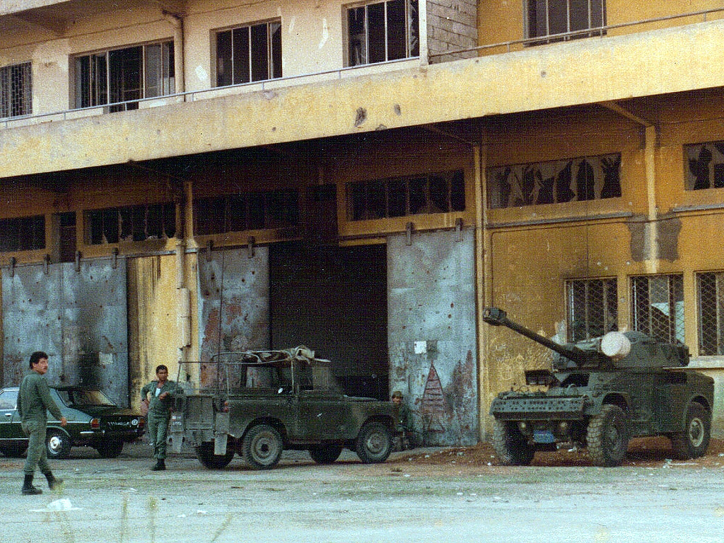 Lebanese Army, Beirut, Lebanon 1982